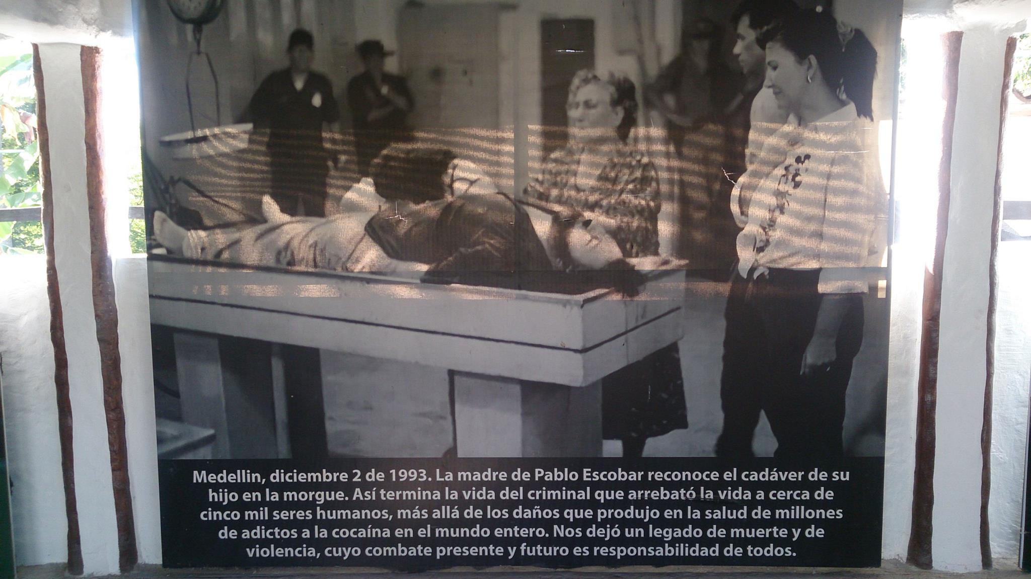 Esta fotografía fue tomada en el municipio colombiano con código 05591.